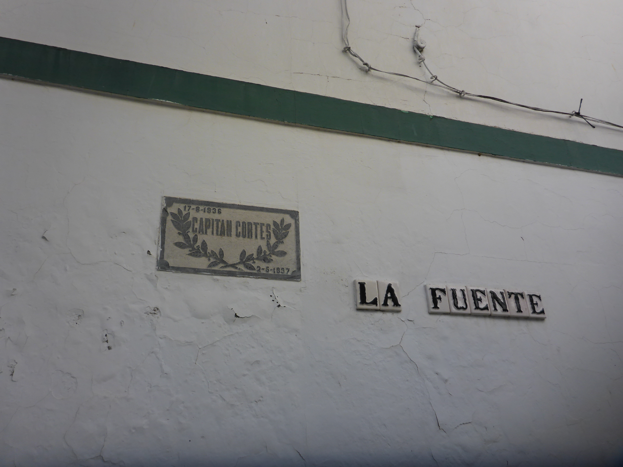 Rótulo de la calle Santiago Cortés González en El Bosque (Andalucía, España)